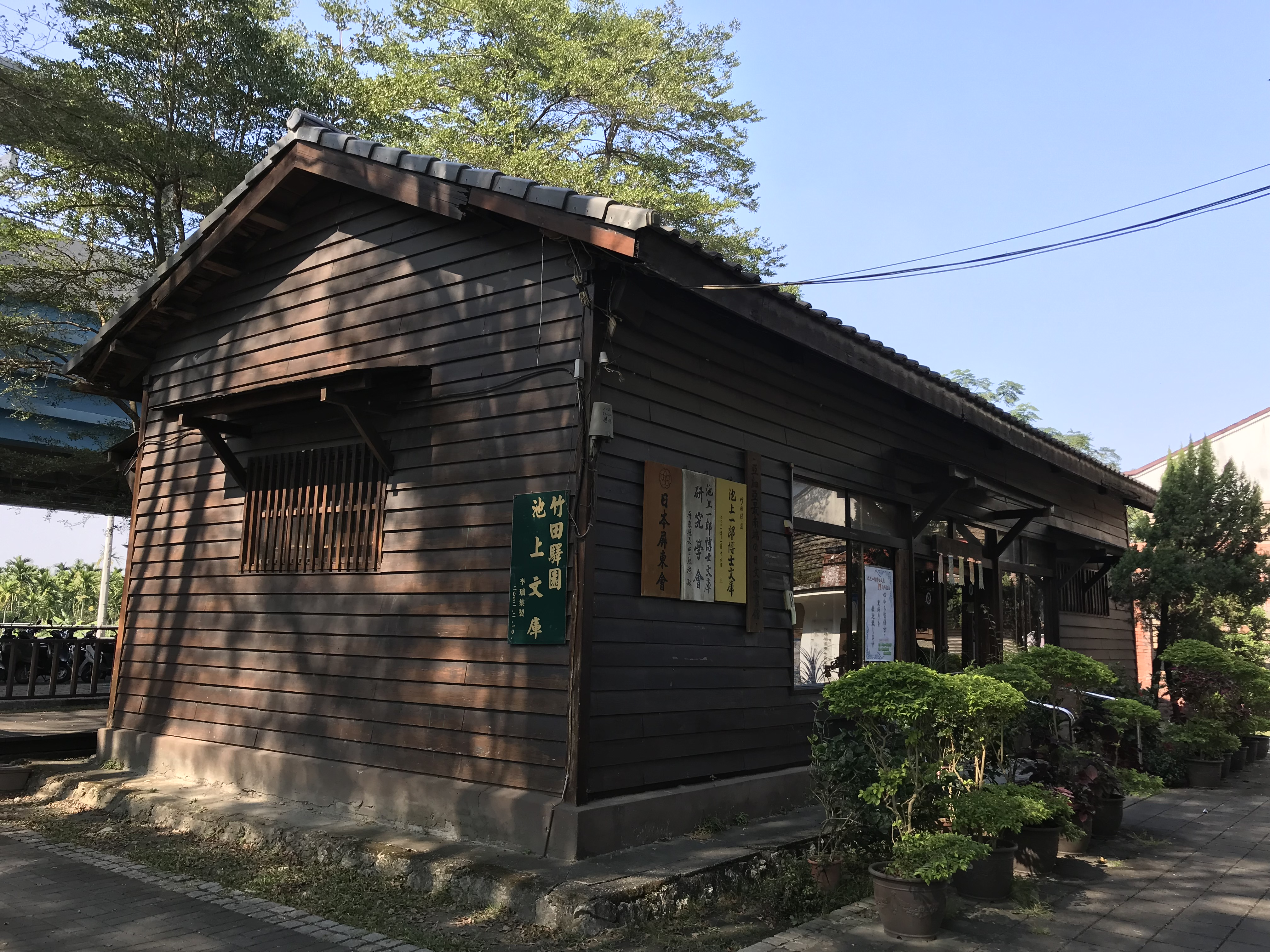 池上一郎博士文庫一景